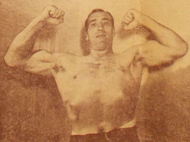 Maurice "The Angel" Tillet en page 6 du journal de catch Wrestling News Pictural Pulse du 9 janvier 1947.